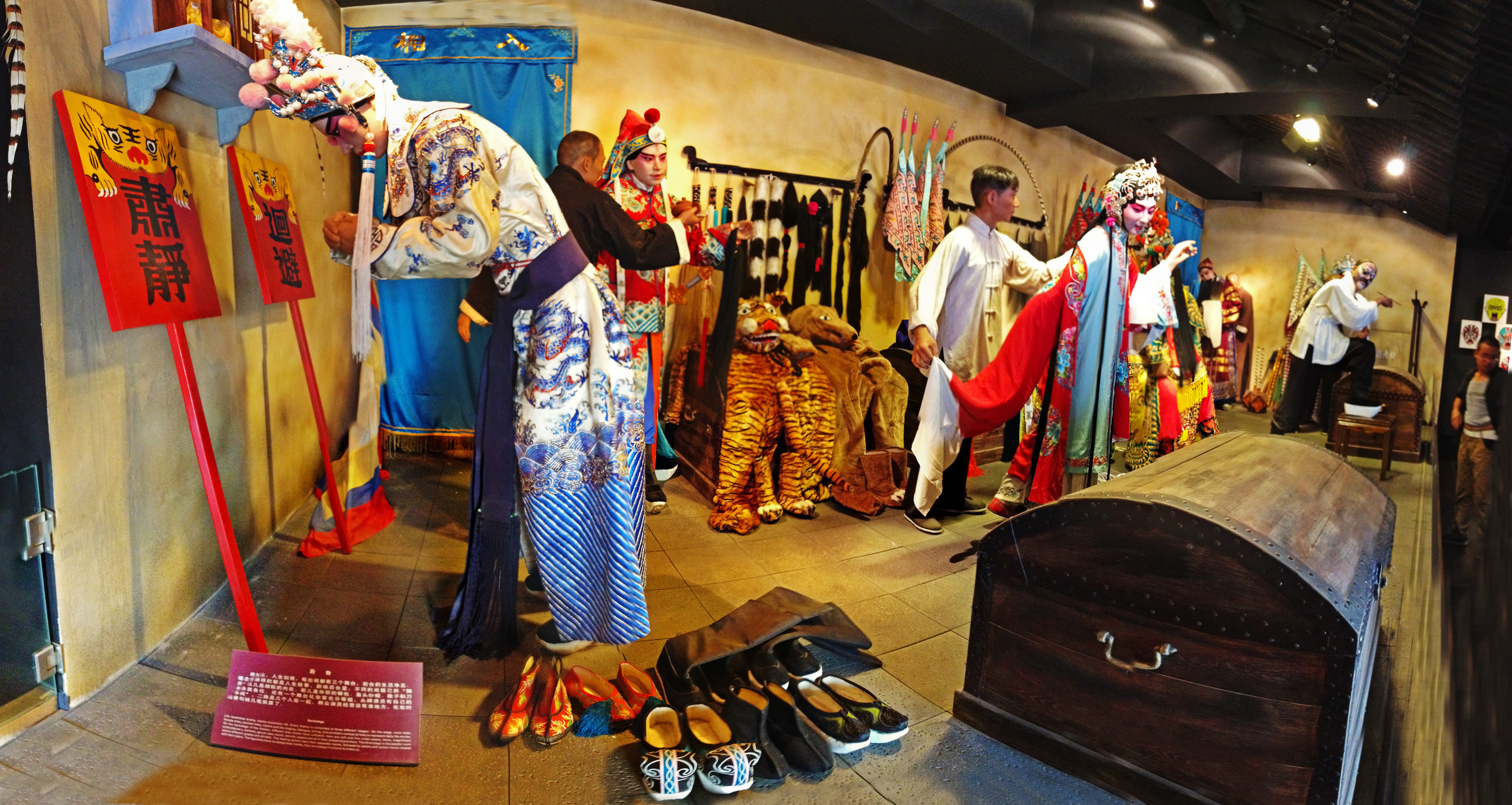 20120730甘肃兰州黄河北岸白塔山下秦腔博物馆展室3